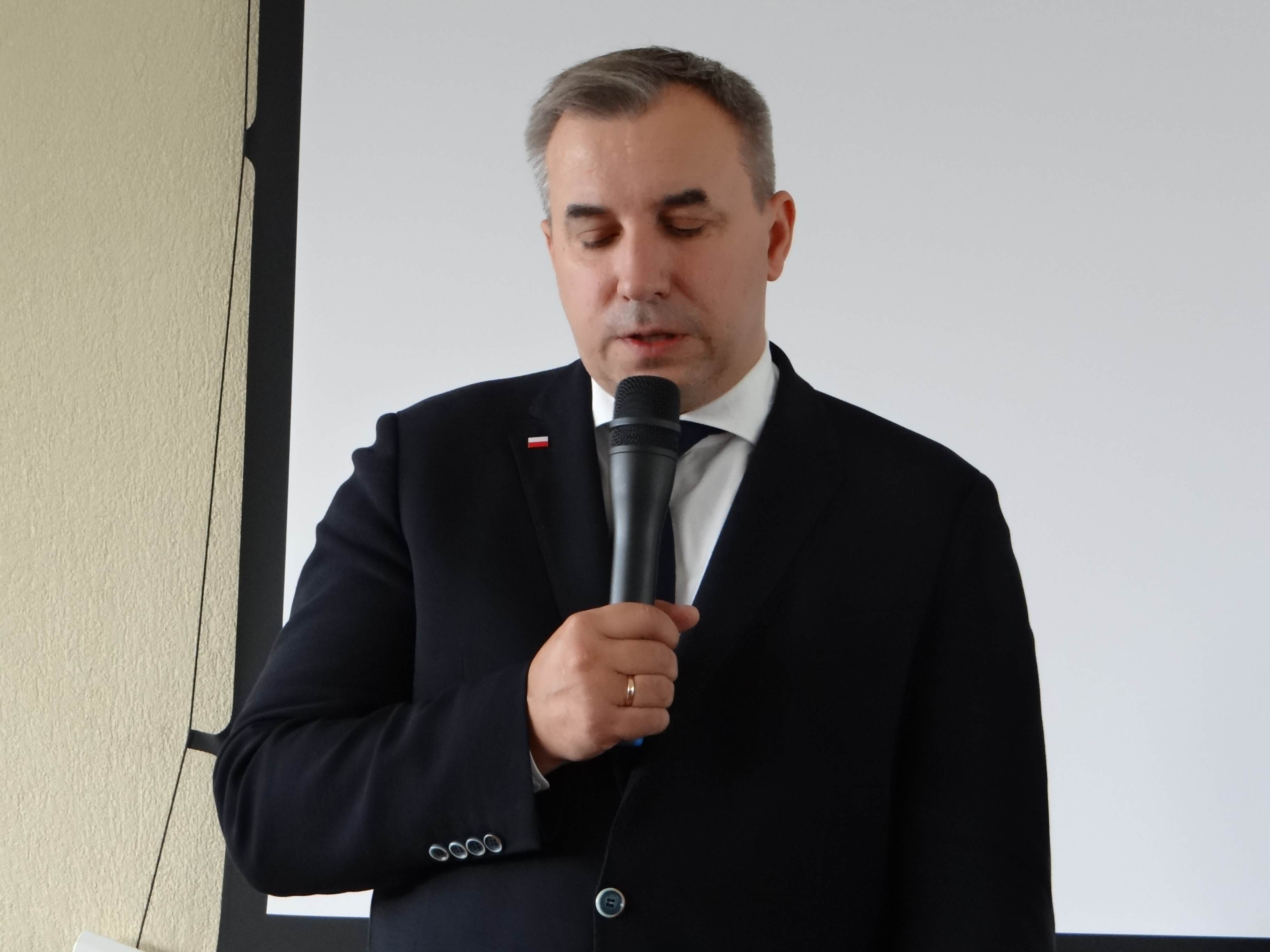 Spotkanie z Wojciechem Sumlińskim w stalowowolskiej Bibliotece Międzyuczelnianej 6 października 2015 roku.